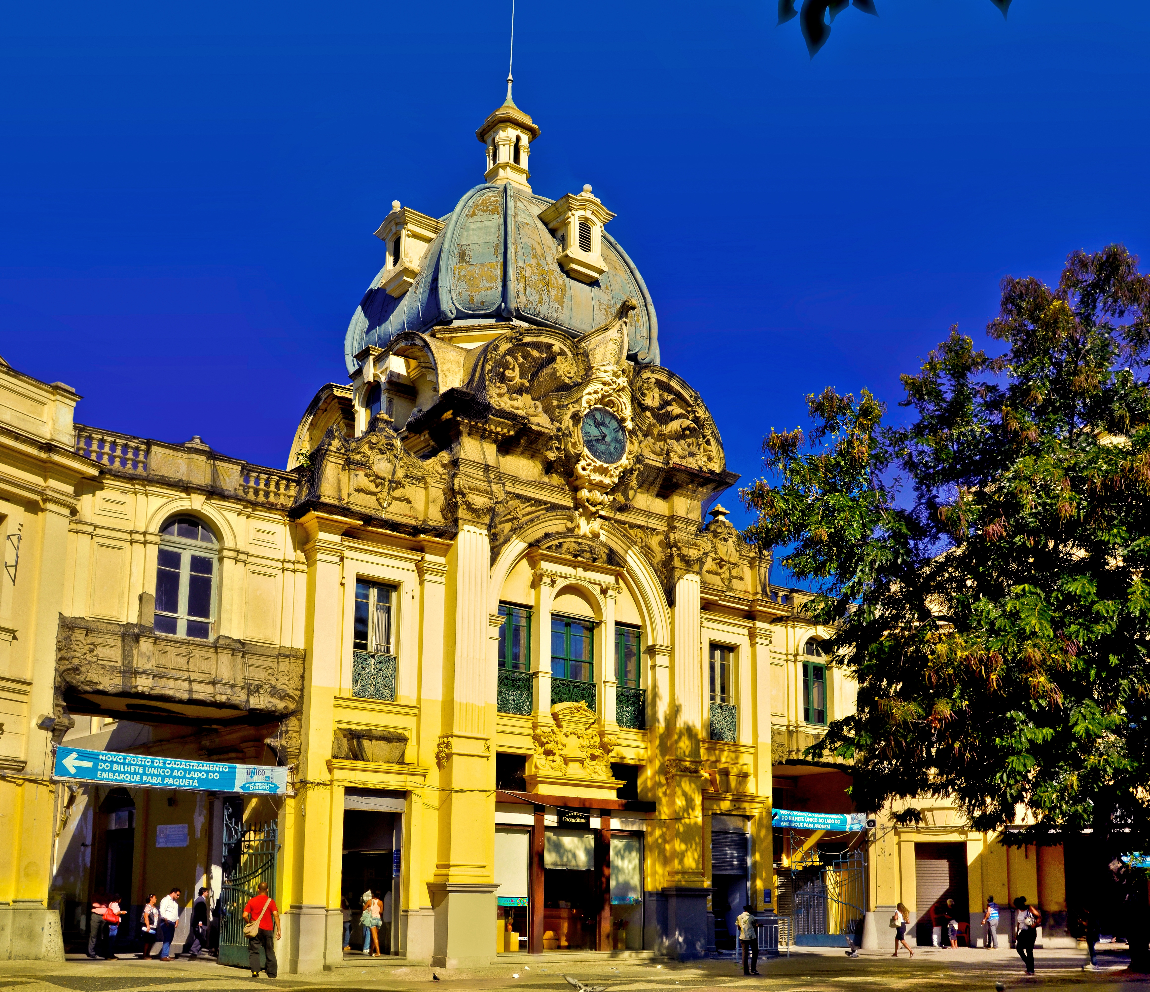 Área central da Praça Quinze de Novembro e imediações - Em destaque, edifício da estação das barcas